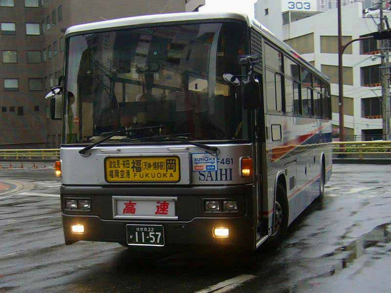 登録番号：佐世保22か11-57 西肥自動車所属 車番F481 させぼ号用 三菱ふそう・エアロバス U-MS726S 元・九州急行バス